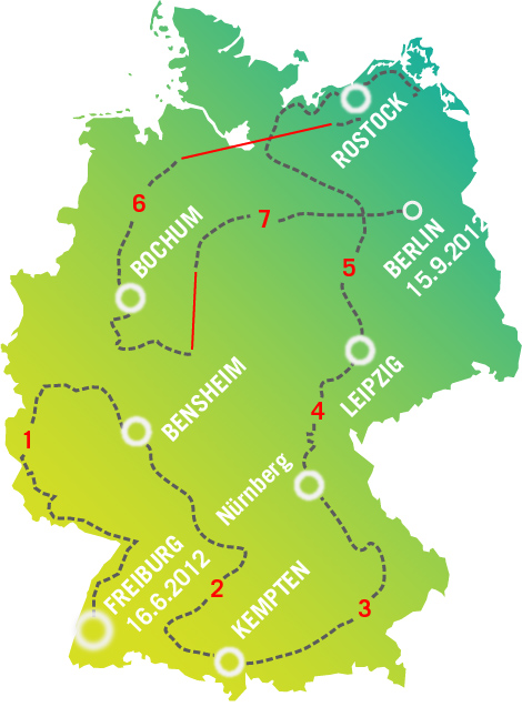 Karte der ersten Mood-Tour